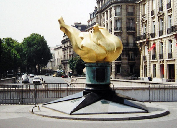 Am Südende des Platzes Place de l'Alma, Paris, steht diese originalgroße Nachbildung der Flamme der amerikanischen Freiheitsstatue in New York, gestiftet von der New Yorker Zeitung Herald Tribune. Der Place de l'Alma trägt seinen Namen von zum Gedenken an die Schlacht von Alma (1854) während des Krimkrieges (1853-1856). Seit dem tödlichen Unfall von Lady Diana Spencer Ende August 1997 in der Unterführung unter dem Place de l'Alma, wurde diese Skulptur durch Touristen zu ihrer inoffiziellen Pariser Gedenkstätte.